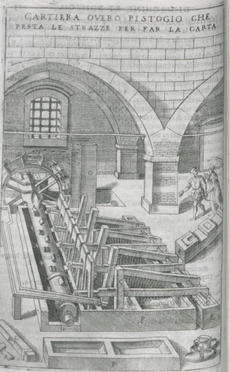 Macchina a pistoni per il pestaggio e preparazione degli stracci per la realizzazione della carta. Tratto da Novo teatro di machine et edificii